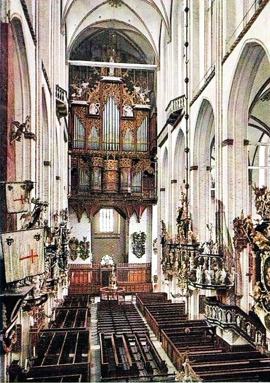 Mittelschiff, Blick nach Westen vor der Zerstörung 1942. Foto wurde später nachträglich colouriert.